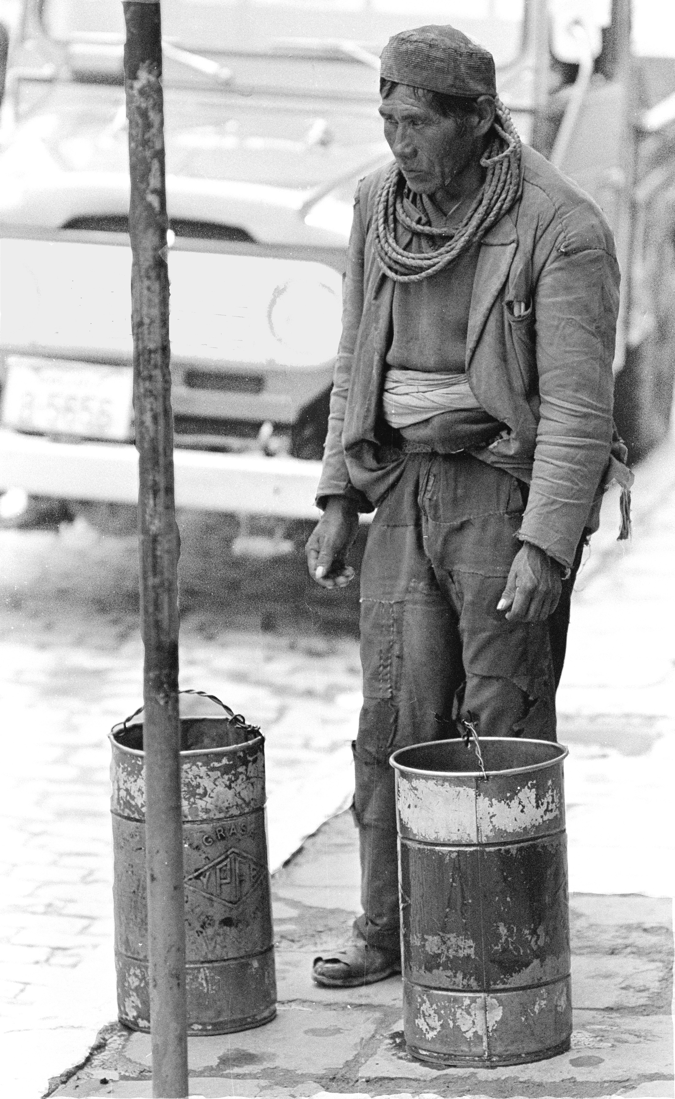 Fotografía de un aparapita tomada por Javier Molina Barrios para el libro "Imágenes Paceñas"